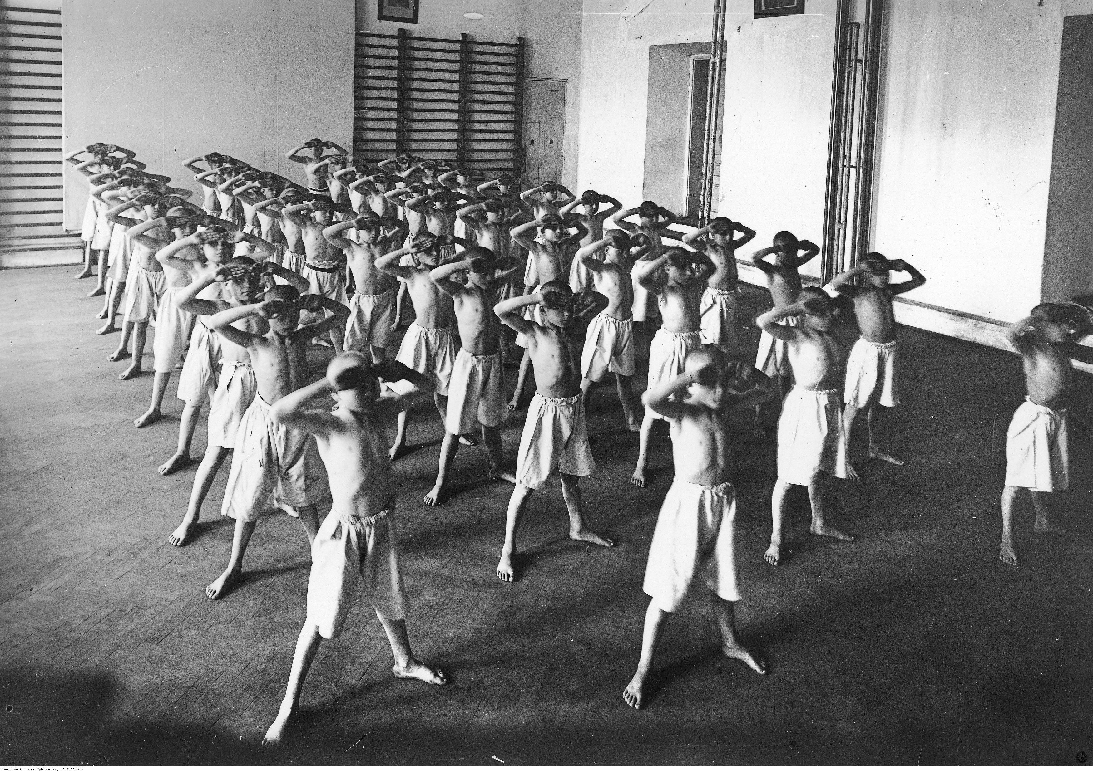 Zakład Sierot i Ubogich w Drohowyżu (1934) lekcja gimnastyki